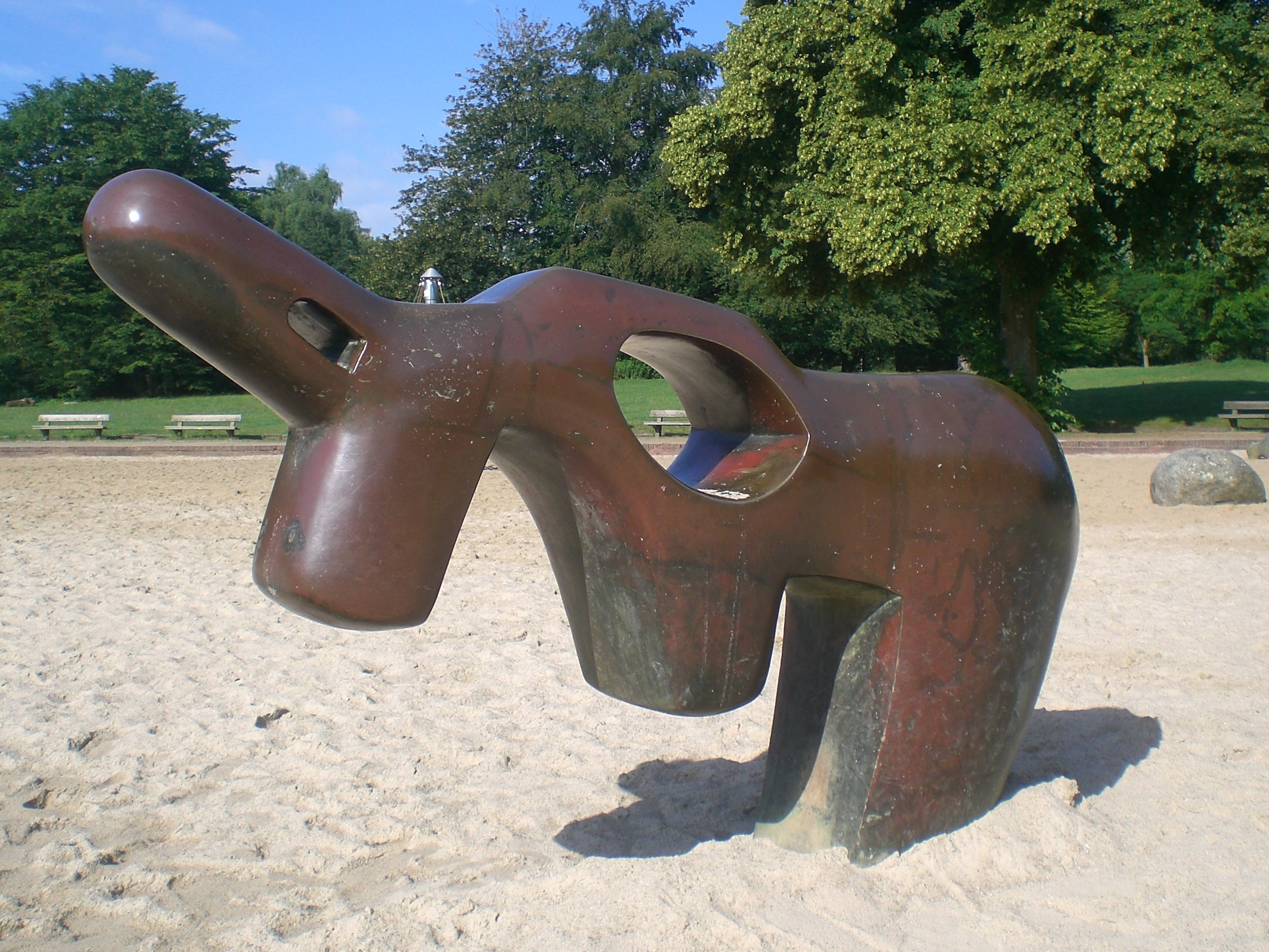 Replik des Wasserspeiers von Richard Haizmann am Planschbecken im Hamburger Stadtpark